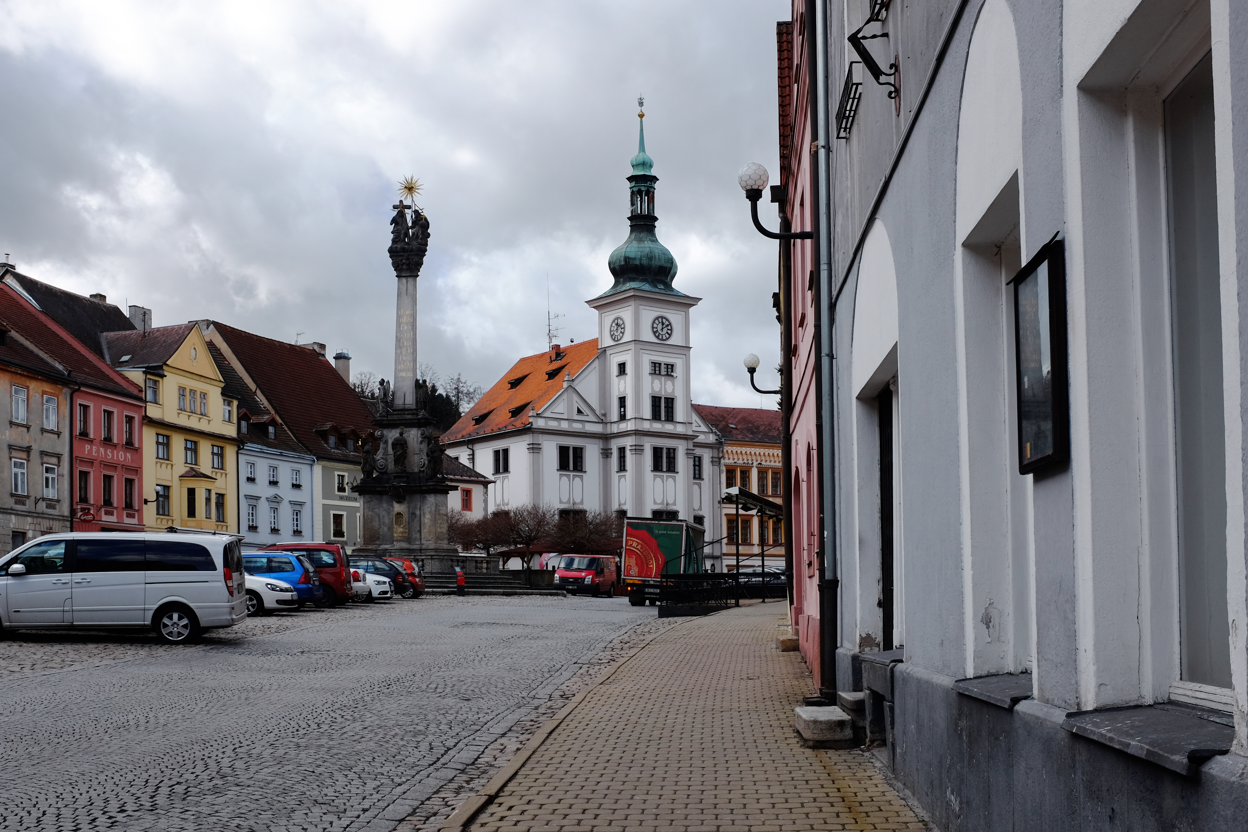 Radnice, T. G. Masaryka 1/69, Loket (okres Sokolov).